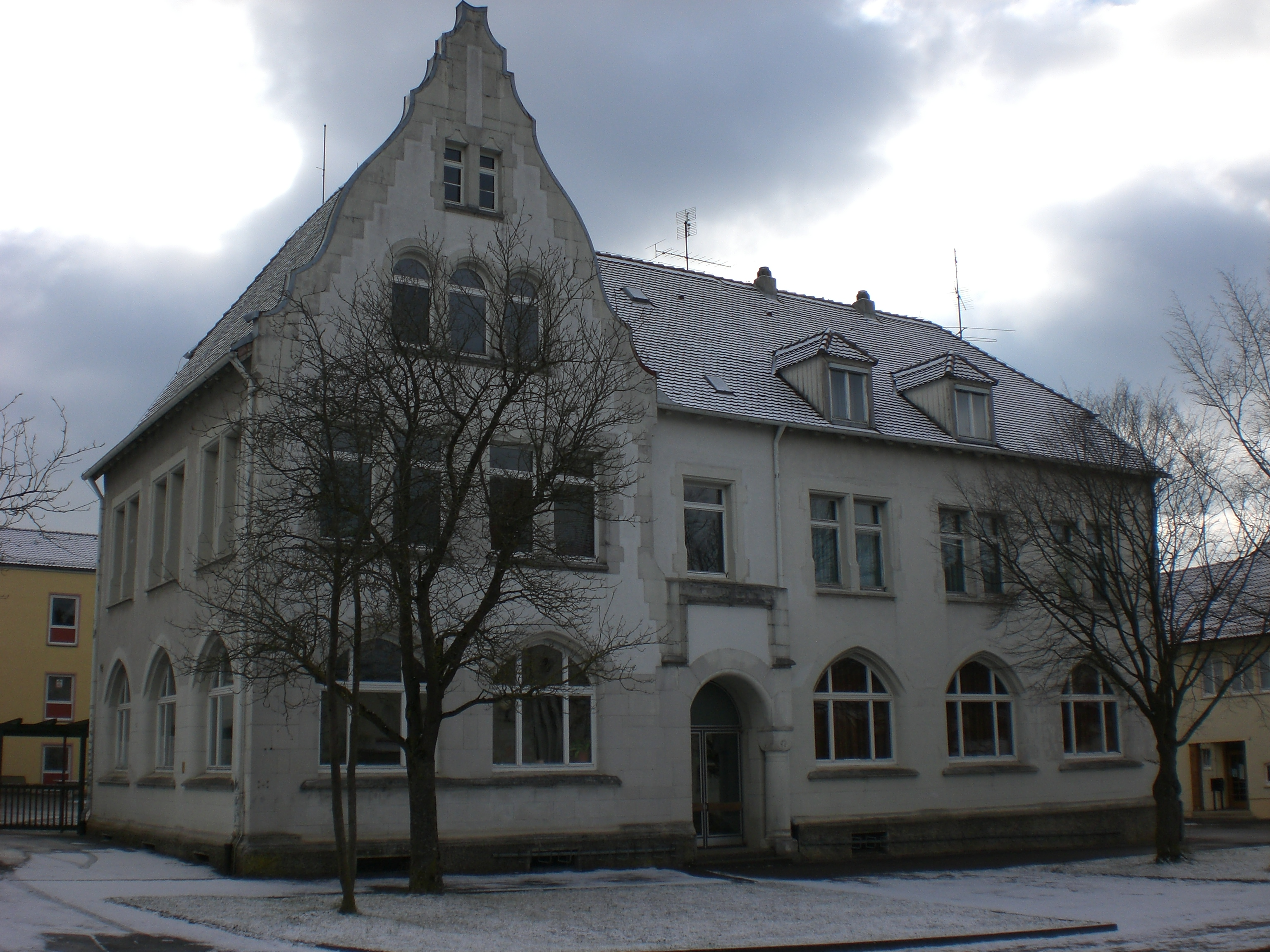 Altes Schulhaus Schelklingen, Deutschland.